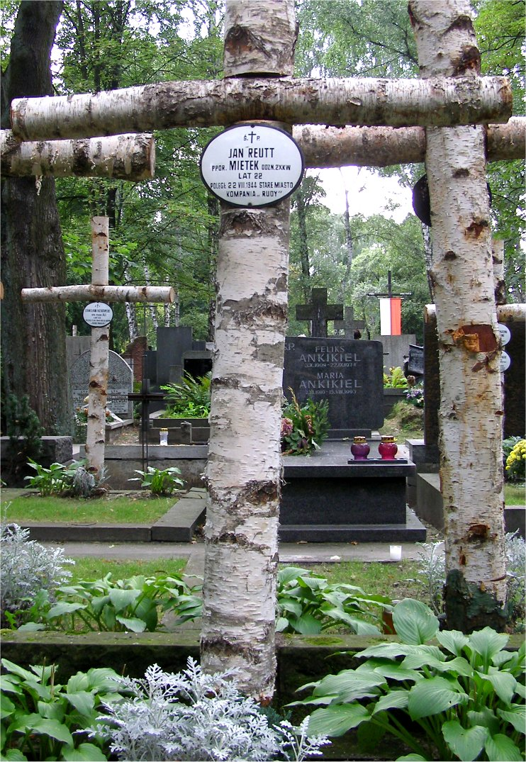 Jan Reutt